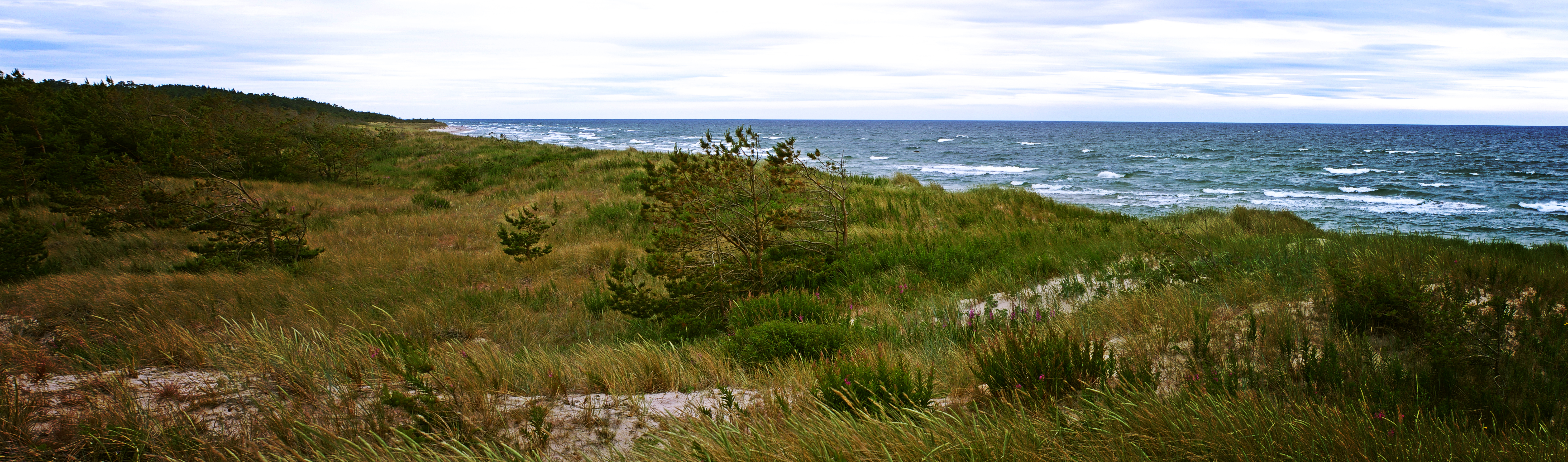 Gotska Sandon, Sweden